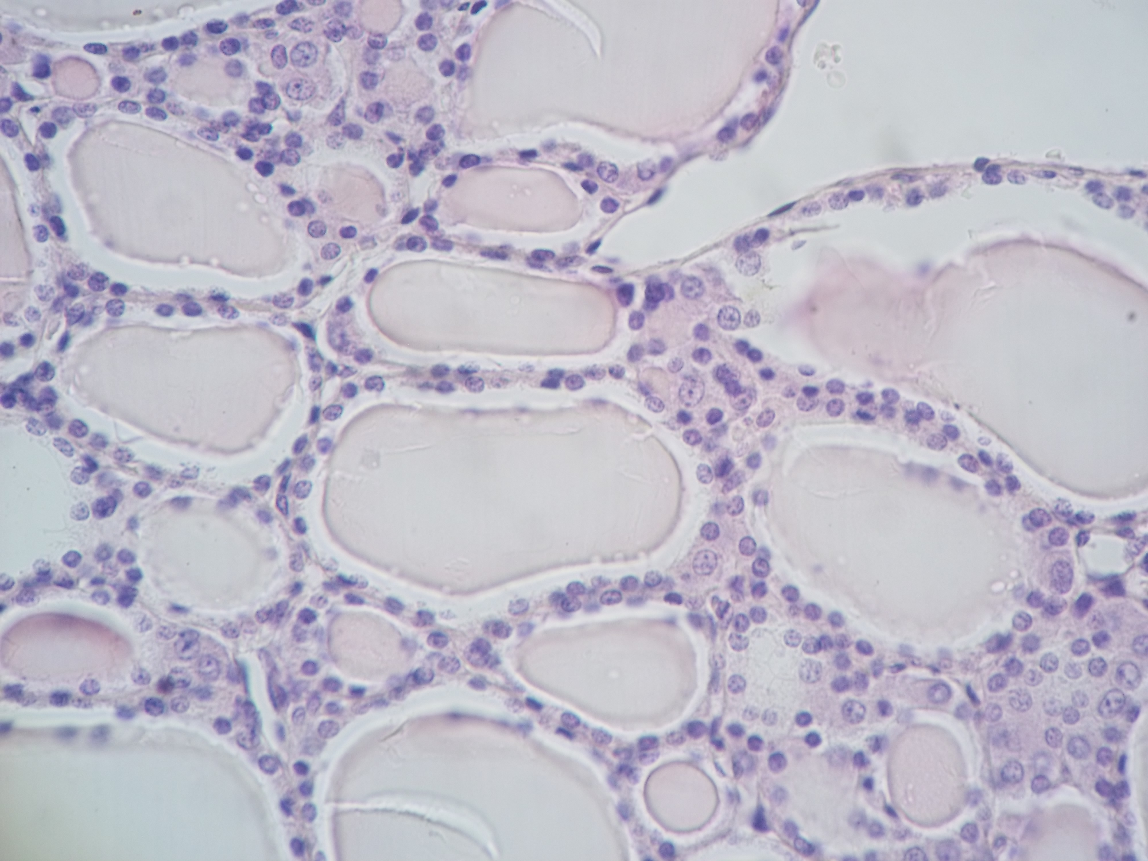 Tiroides, 100X; Hematoxilina-eosina